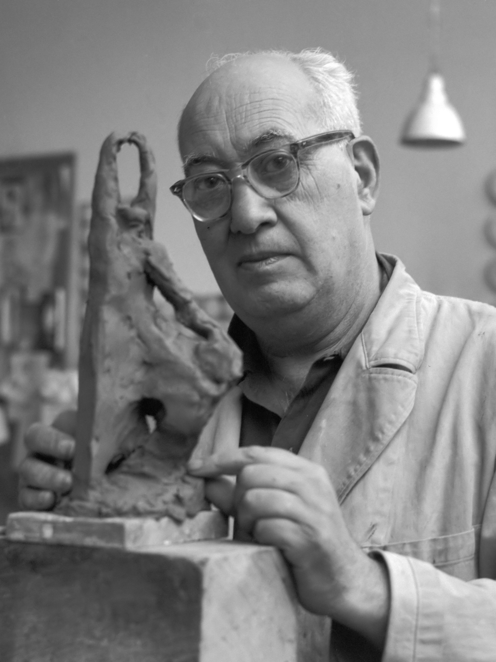 Opdracht Rotterdammer, Beeldhouwer Carasso (portret) 13 mei 1963